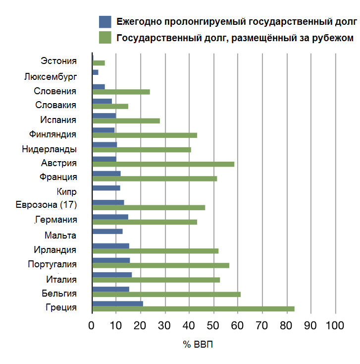 Величина государственной задолженности ряда европейских стран, в т.ч. величина ежегодно пролонгируемого госдолга и доля госдолга, размещённого за рубежом (% от ВВП). Источник: Не очевидно, приведены ли данные за 2010 или 2011 г.